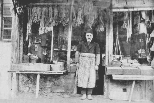 Bakkal Hovhannesin dükkanı, Harput